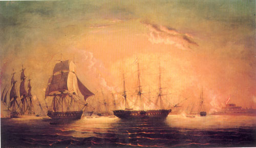 La escuadra chilena del almirante Thomas Cochrane bloqueando por tercera vez el puerto del Callao.